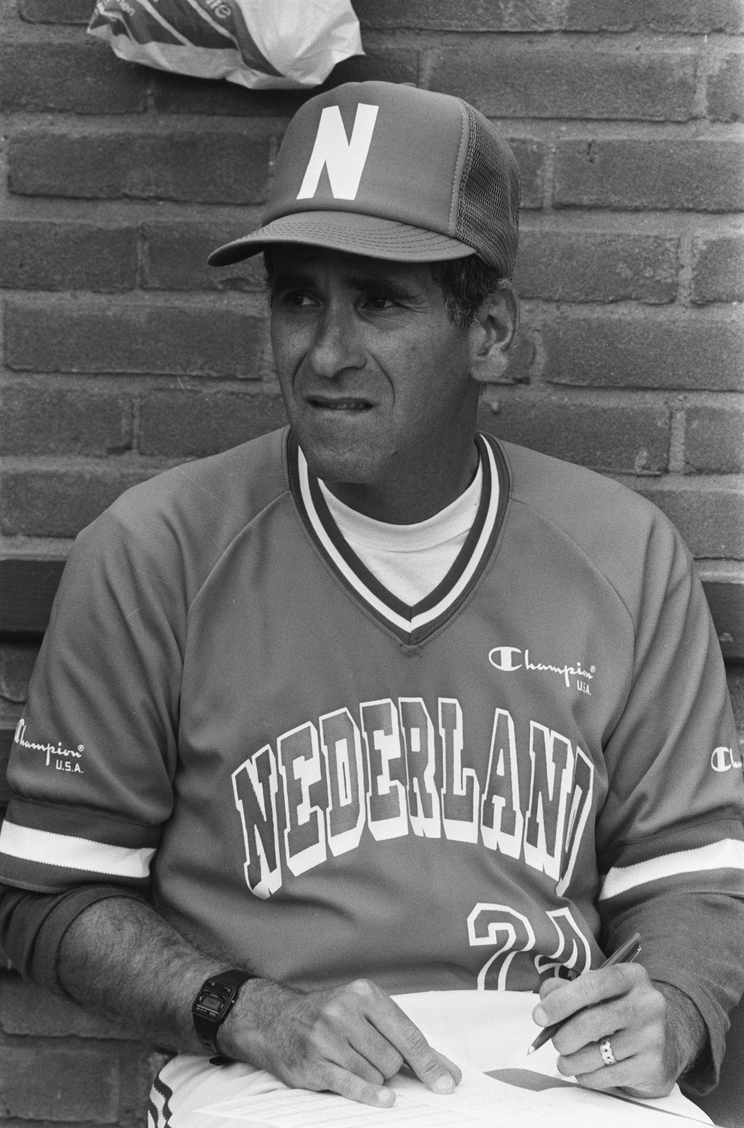 Collectie / Archief : Fotocollectie Anefo Reportage / Serie : [ onbekend ] Beschrijving : Harvey Shapiro , manager Nederlandse honkbalteam, close Datum : 12 juli 1986 Trefwoorden : honkbal, managers Persoonsnaam : Harvey Shapiro Fotograaf : Bogaerts, Rob / Anefo Auteursrechthebbende : Nationaal Archief Materiaalsoort : Negatief (zwart/wit) Nummer archiefinventaris : bekijk toegang 2.24.01.05 Bestanddeelnummer : 933-7113